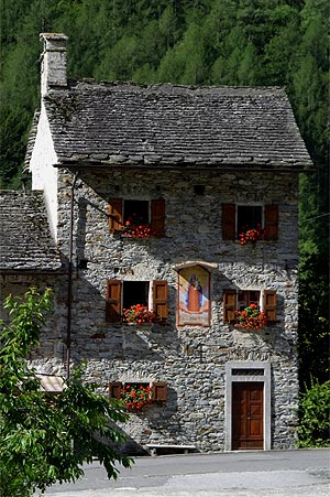 Steinhaus in Sonogno